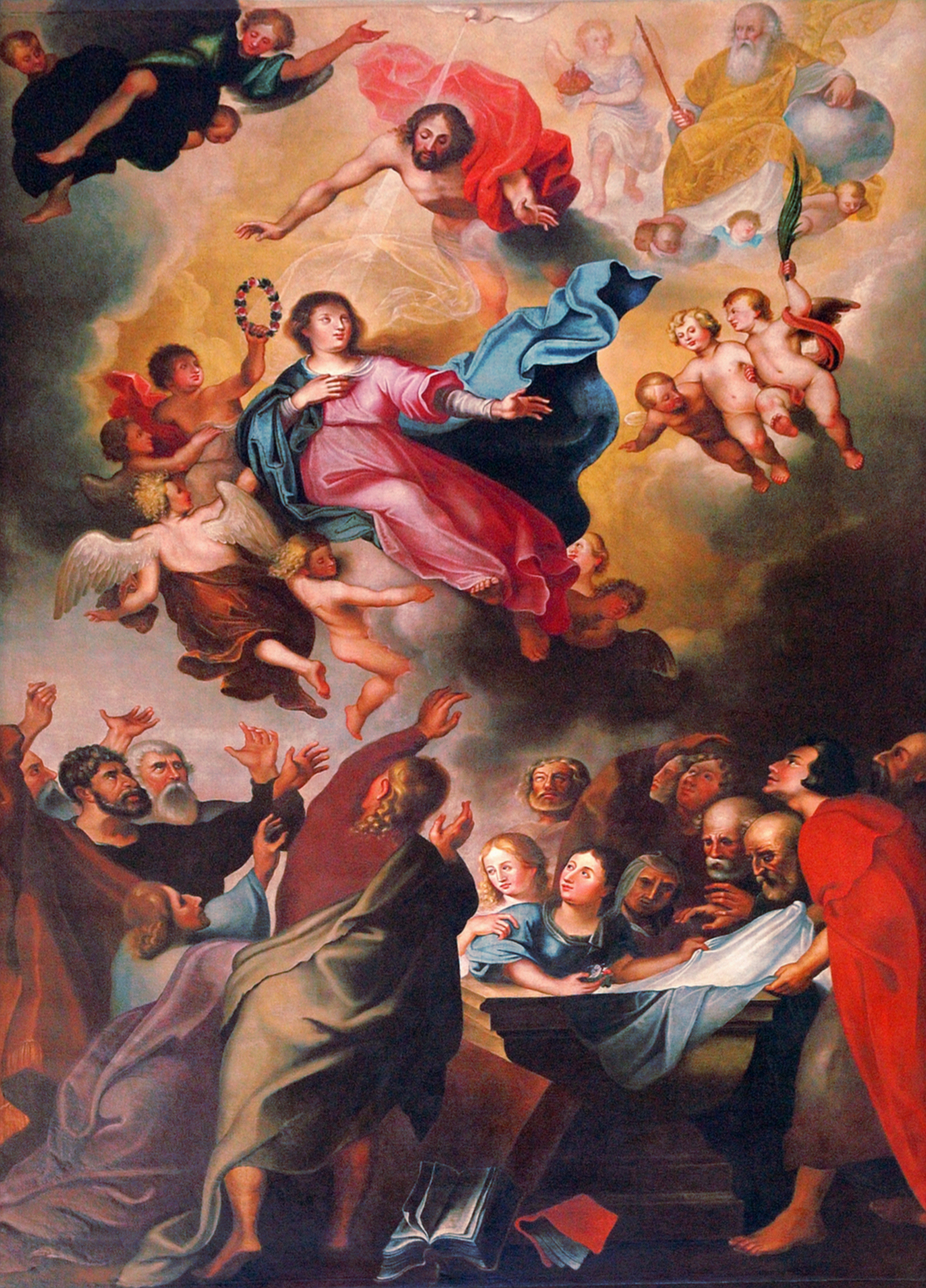 St. Georg Dinkelsbühl, Gemälde Mariae Himmelfahrt